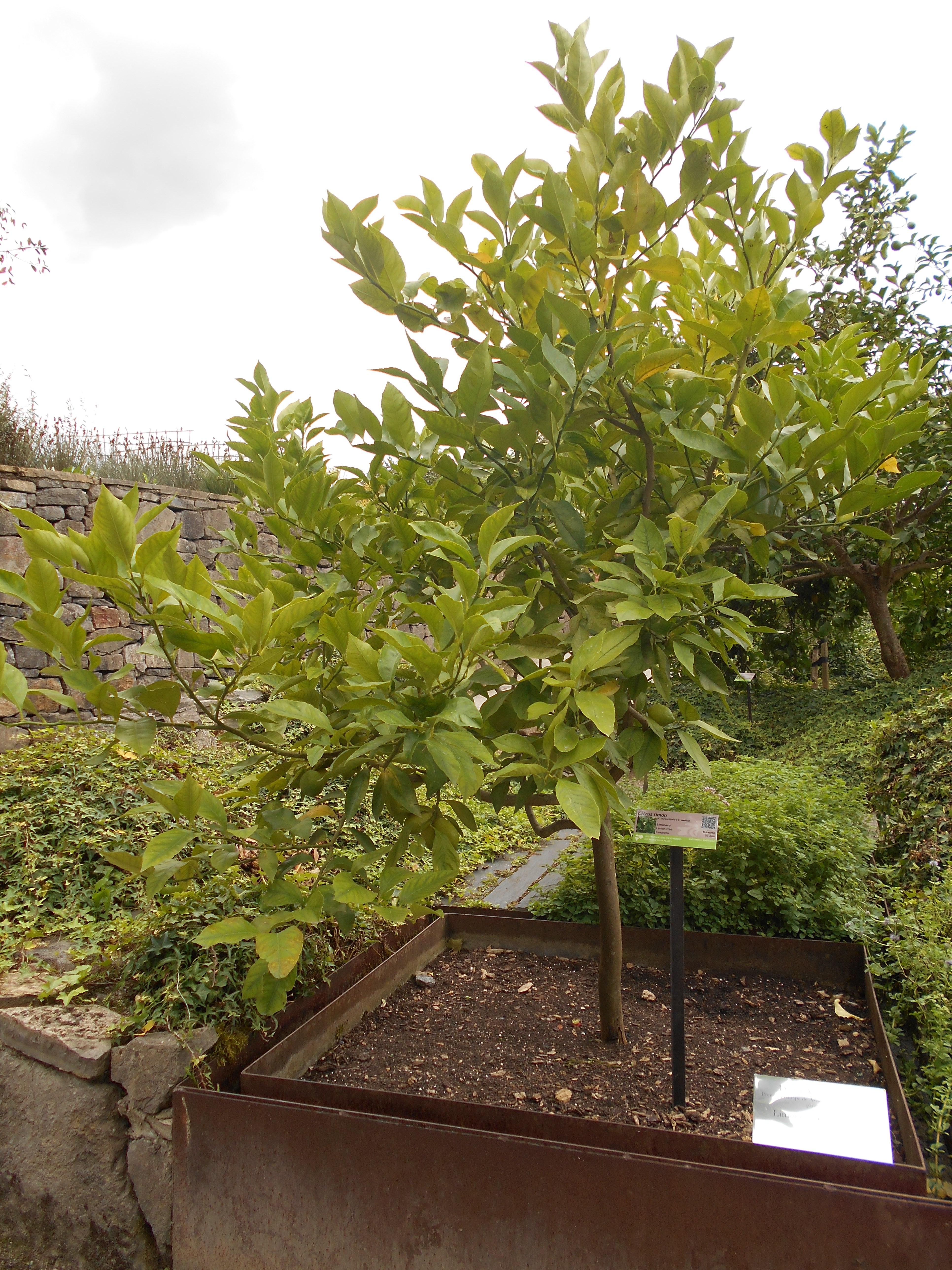 Limonero plantado por Sir David Attenborough en el Jardín Botánico Atlántico de Gijón el año 2009